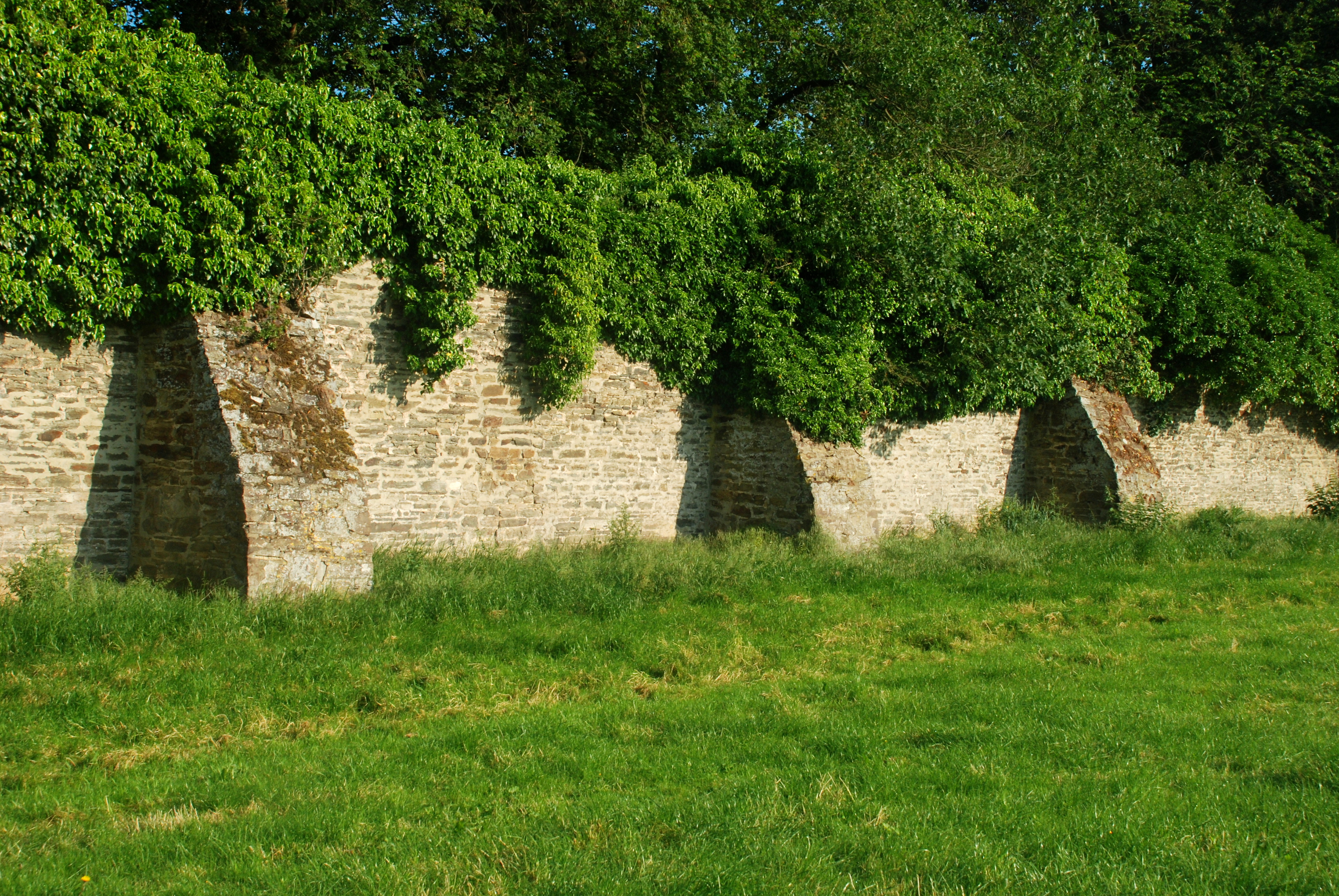 Belgique - Brabant wallon - Mur d'enceinte de l'abbaye de Villers-la-Ville - Côté intra-muros